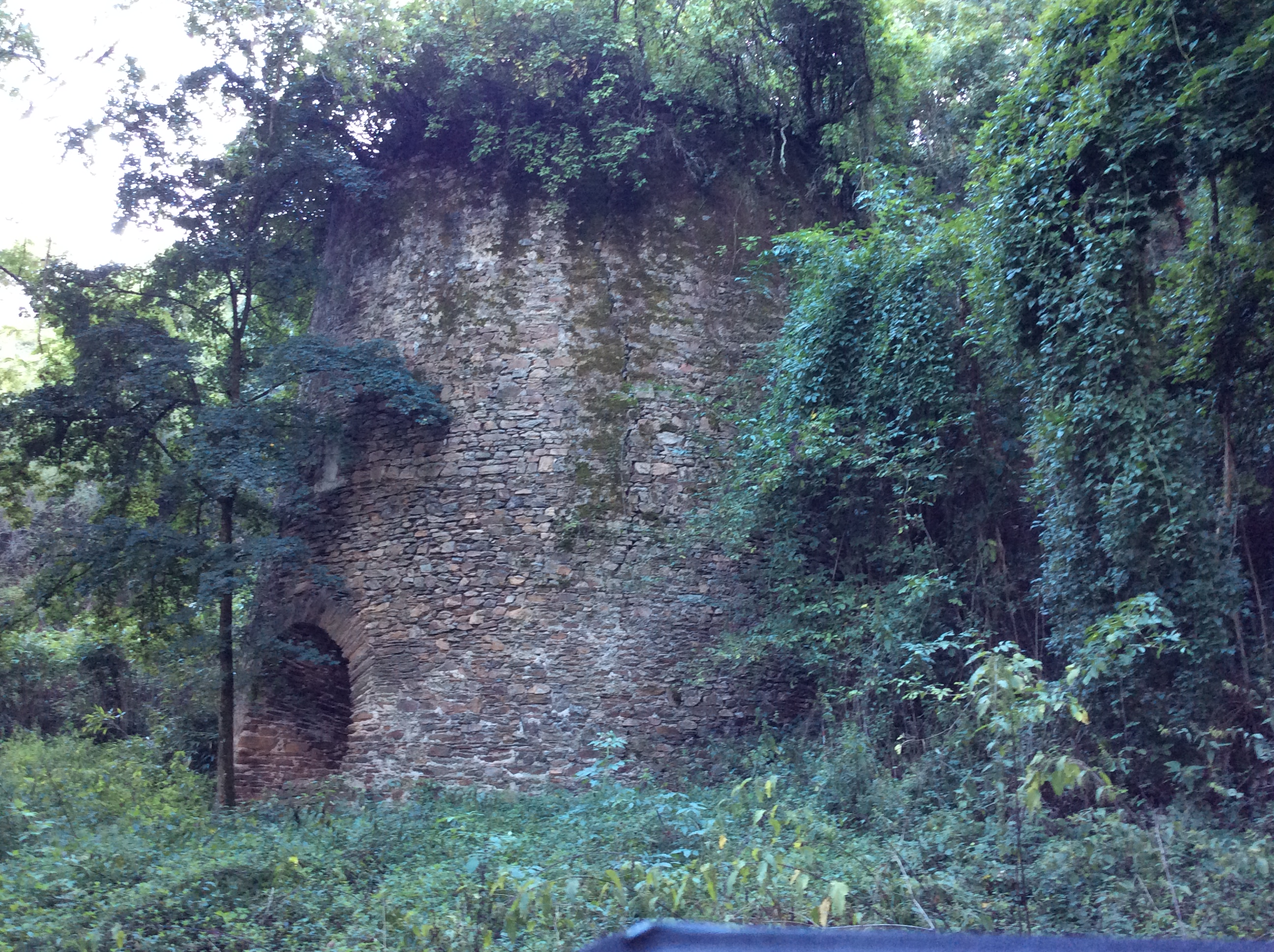 Four à chaux de Saint-Méen - Le Cellier - 44 - France. Dimensions - l'entrée de l'ébraisoir environs 2.5 m de haut